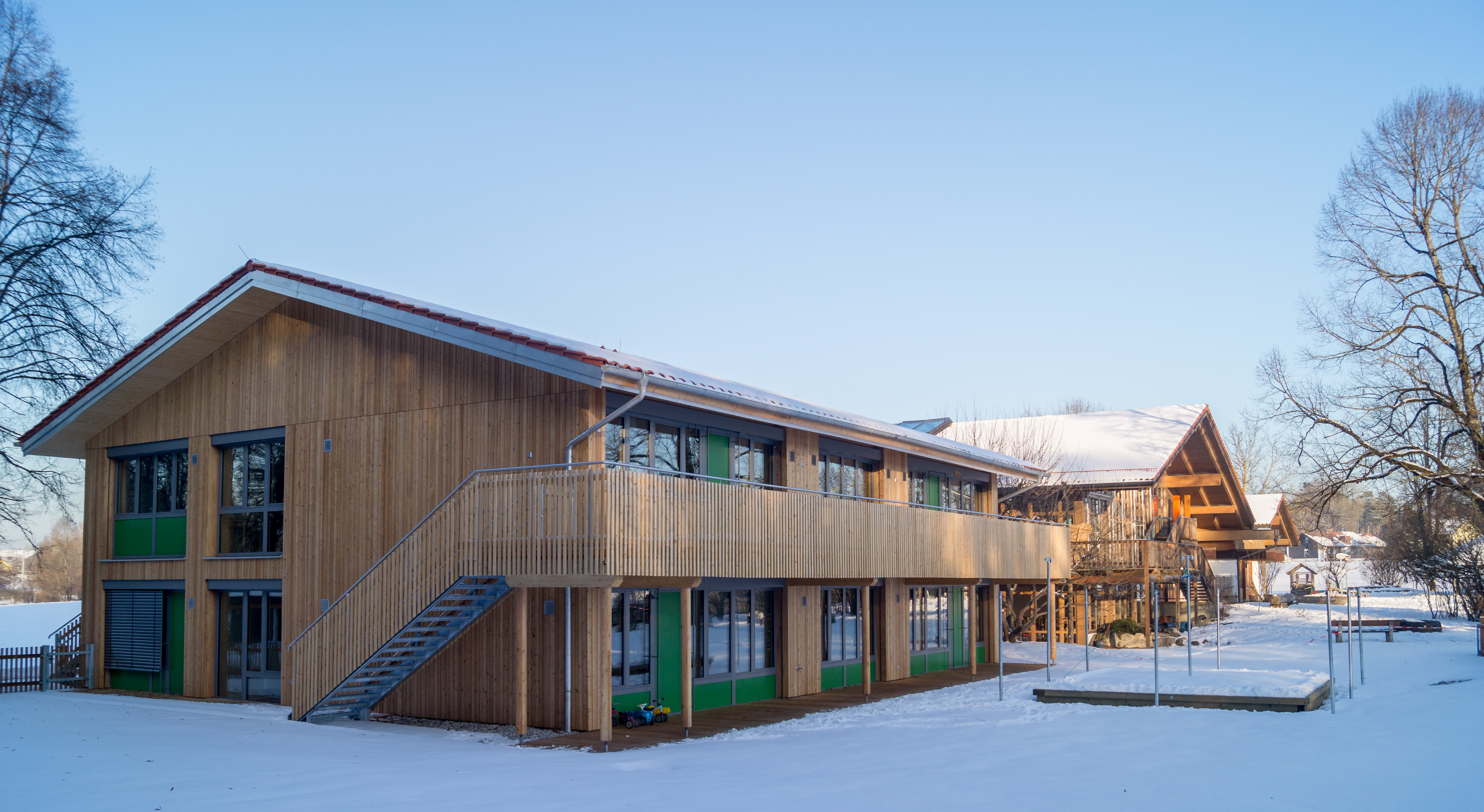 Kindergarten von Iffeldorf mit dem Erweiterungsbau von 2016 (vorne) im Winter.